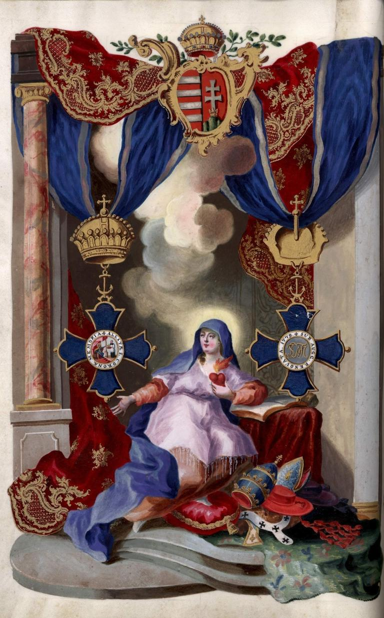 A Crux Tolosana rajza Mária Terézia királynő oklevelén, amelyben ennek viselésére jogosította föl a káptalan tagjait, 1779 (KFL.VIII.B.II.7).